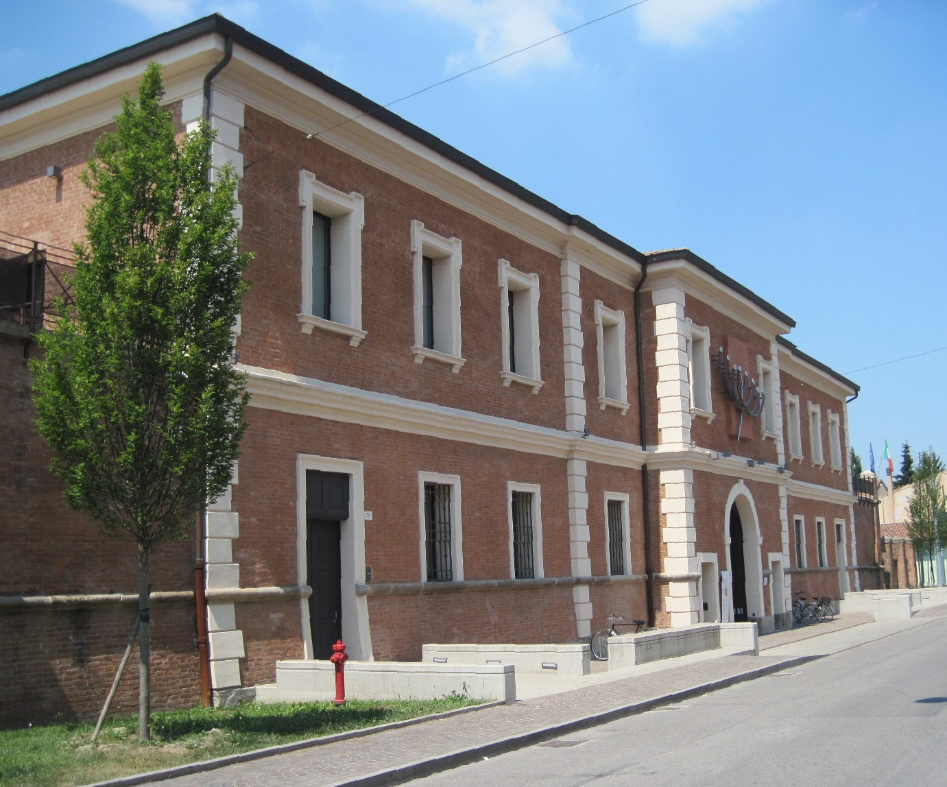 Museo Nazionale dell'Ebraismo Italiano e della Shoah (MEIS) palazzina ingresso